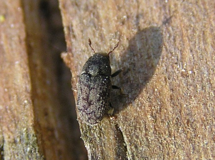 Leperisinus fraxini, Jesionowiec pstry, Polska